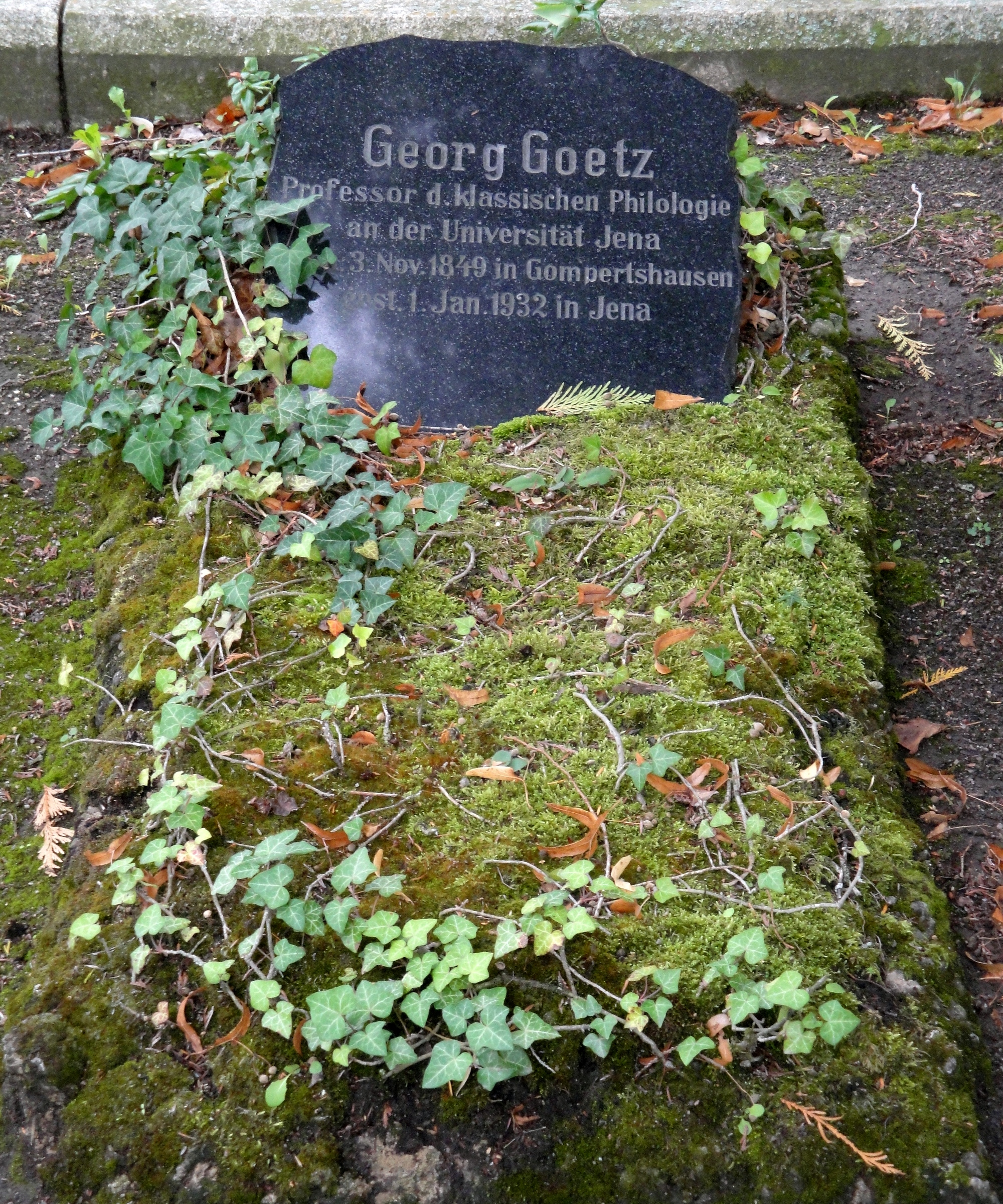 Grab von Georg Goetz auf dem Nordfriedhof in Jena